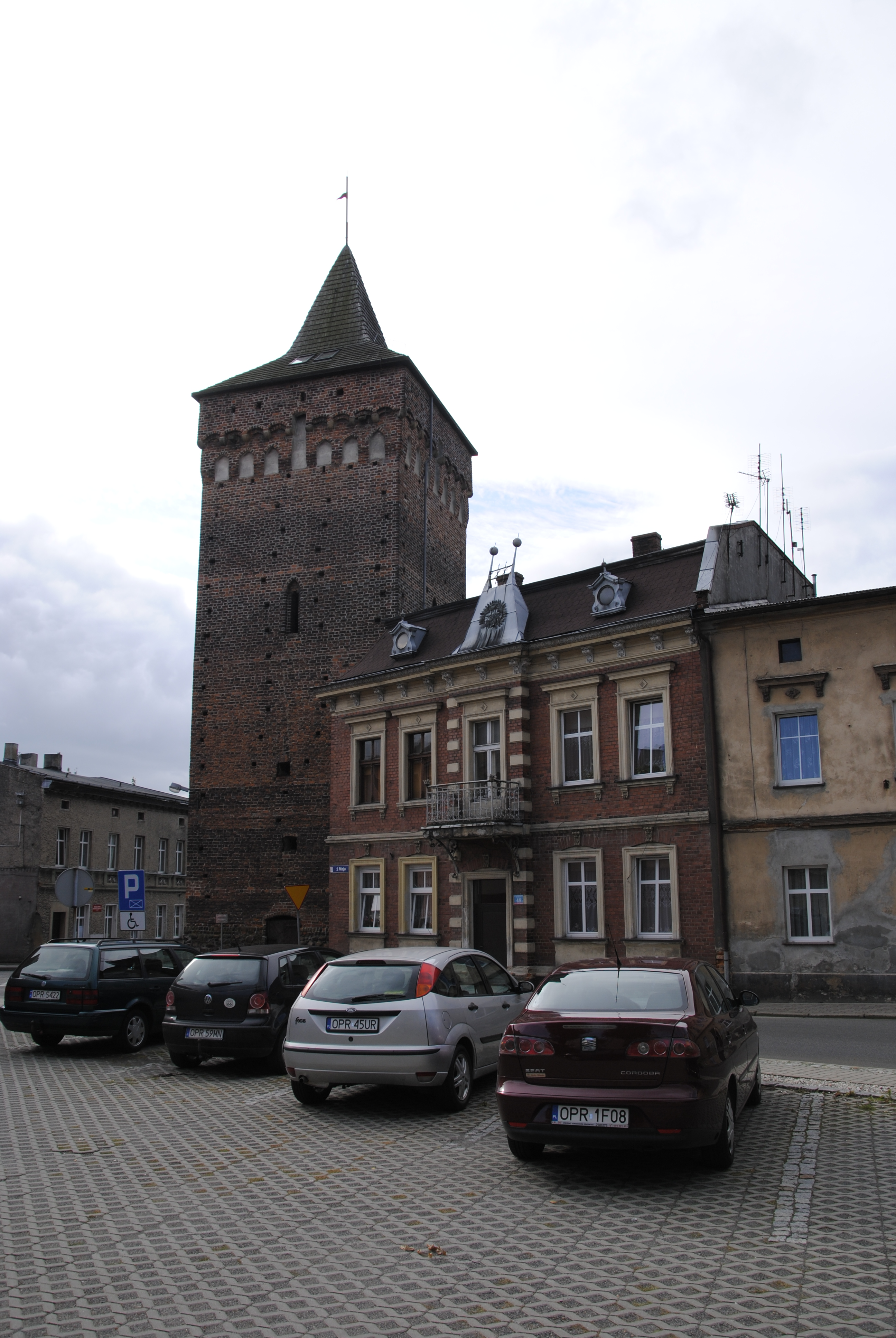 Stadttor in Zülz (Oberschlesien)